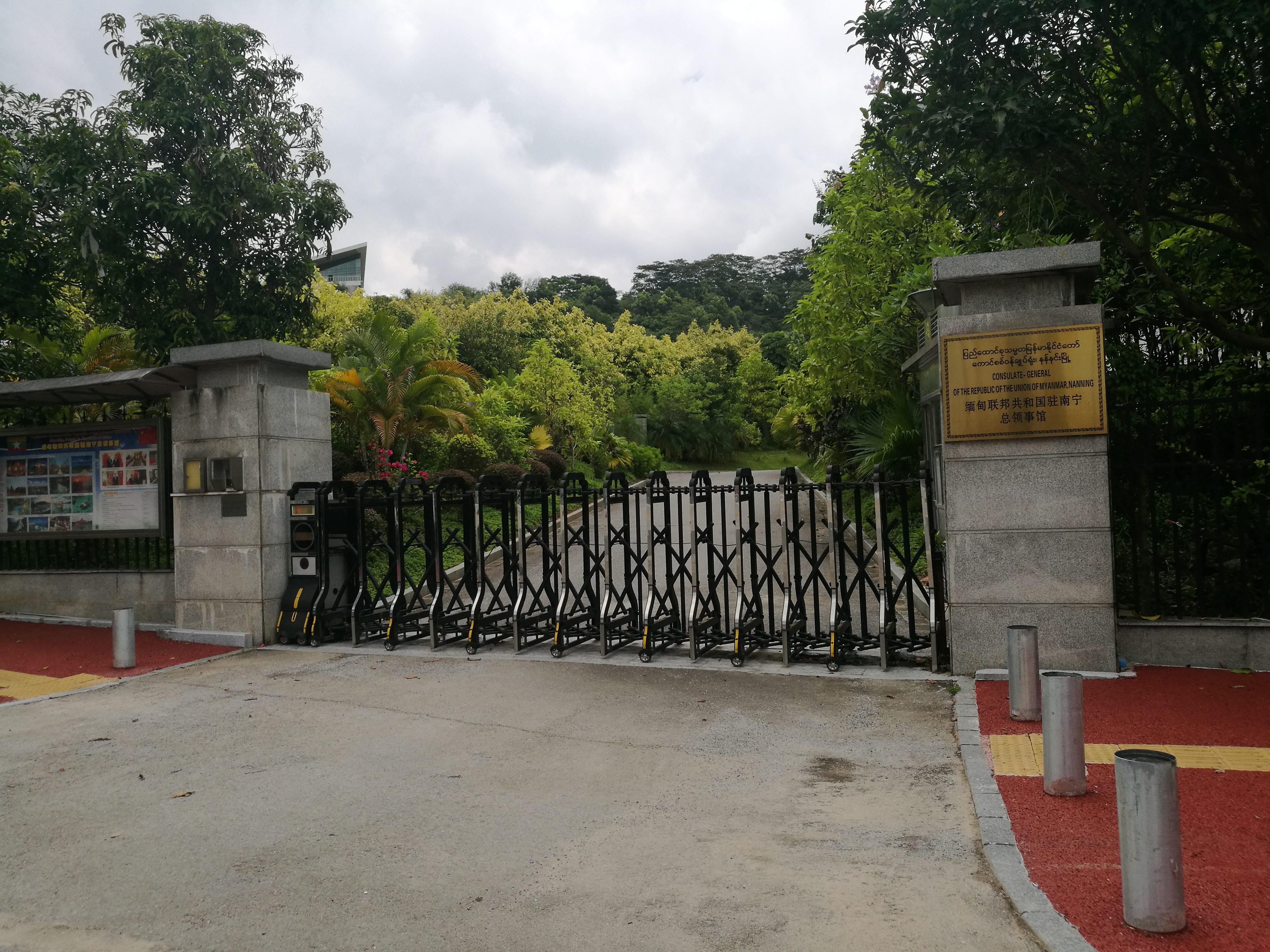 在南寧ミャンマー総領事館の門